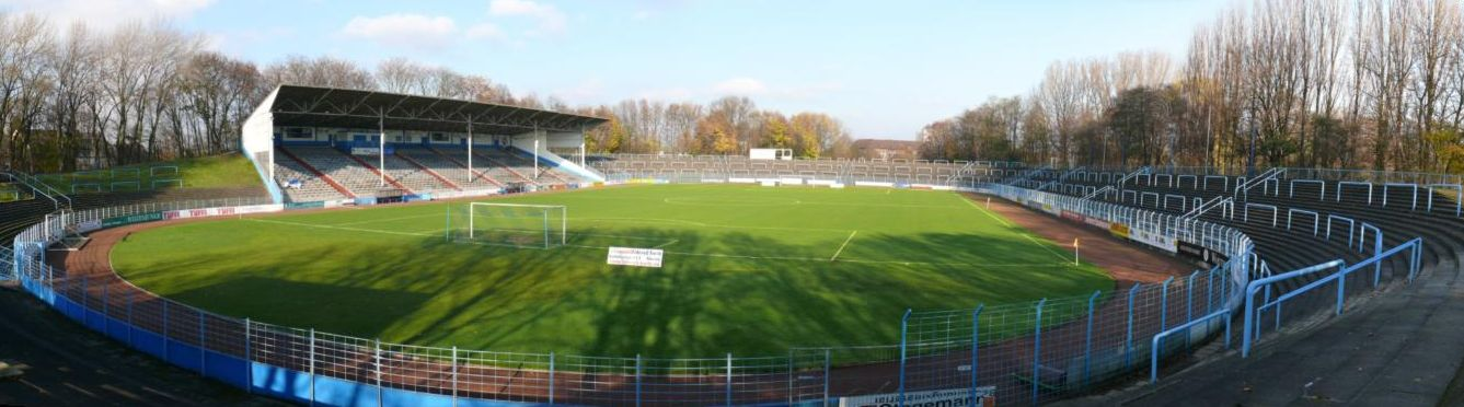 Stadion am Schloss Strünkede, eigene Bilder mit Autostitch zusammengefügt